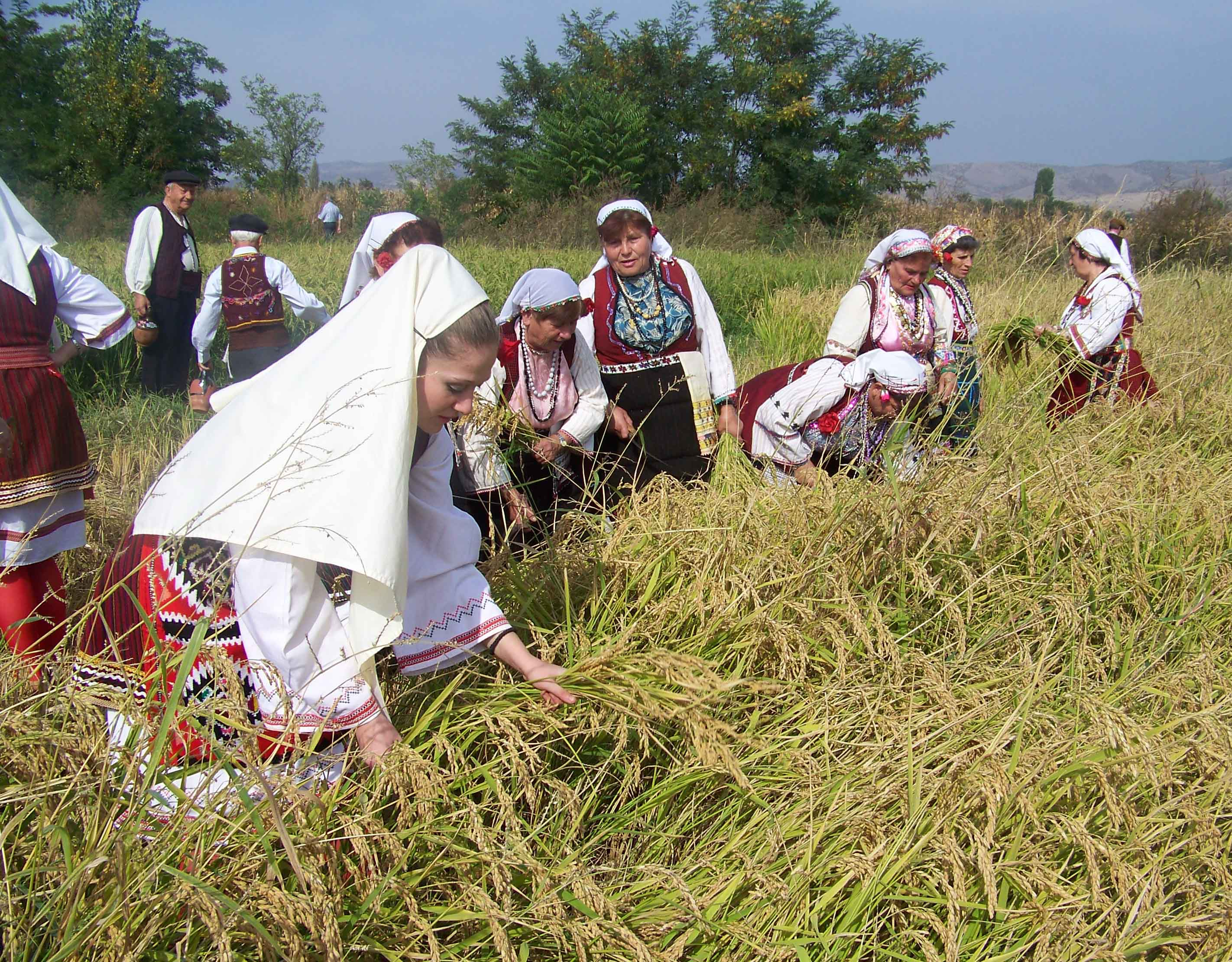 Денови на оризот 2007